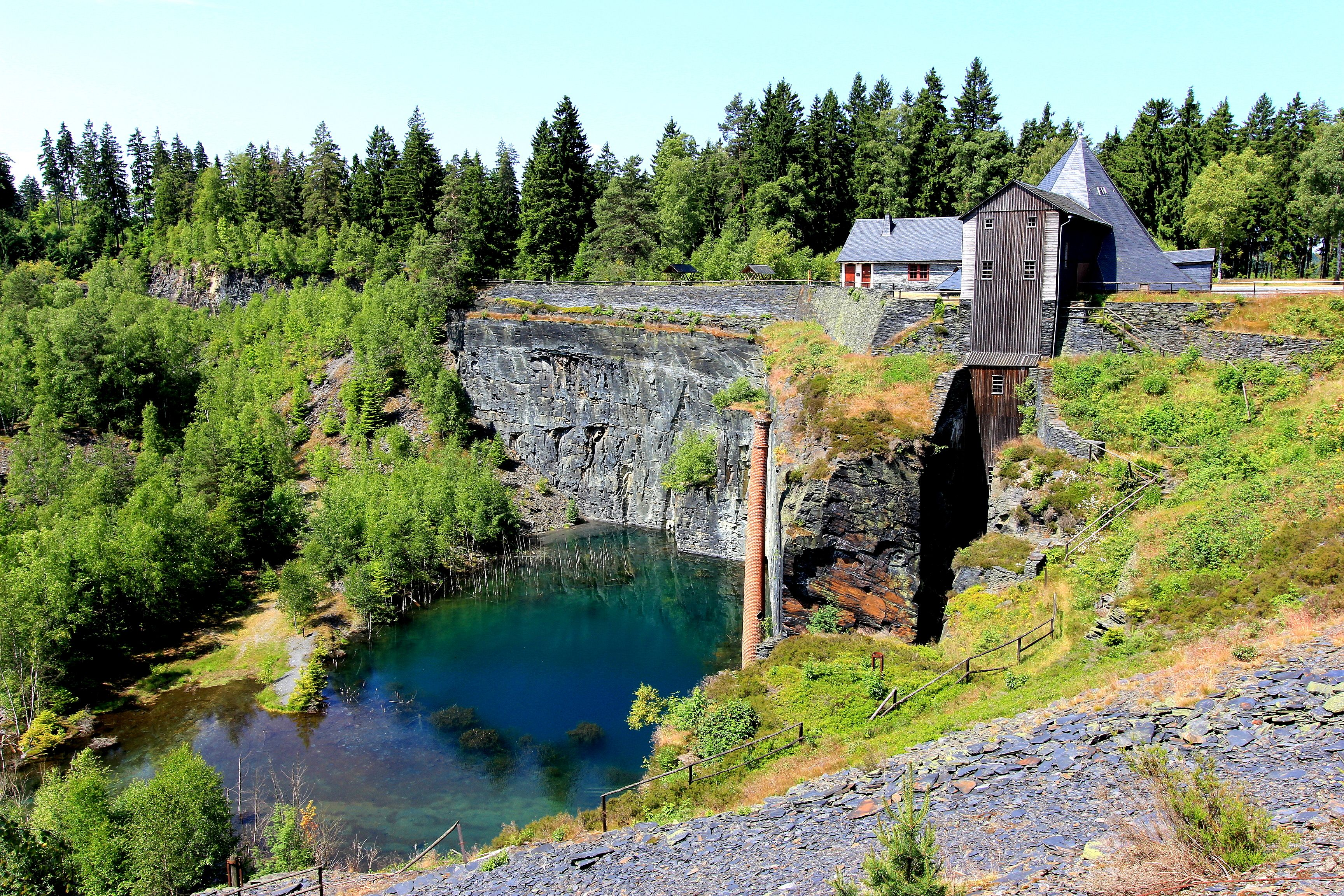 Göpelschachtanlage (Technisches Denkmal) mit Schieferbrüchen im Fauna-Flora-Habitat 5534-301